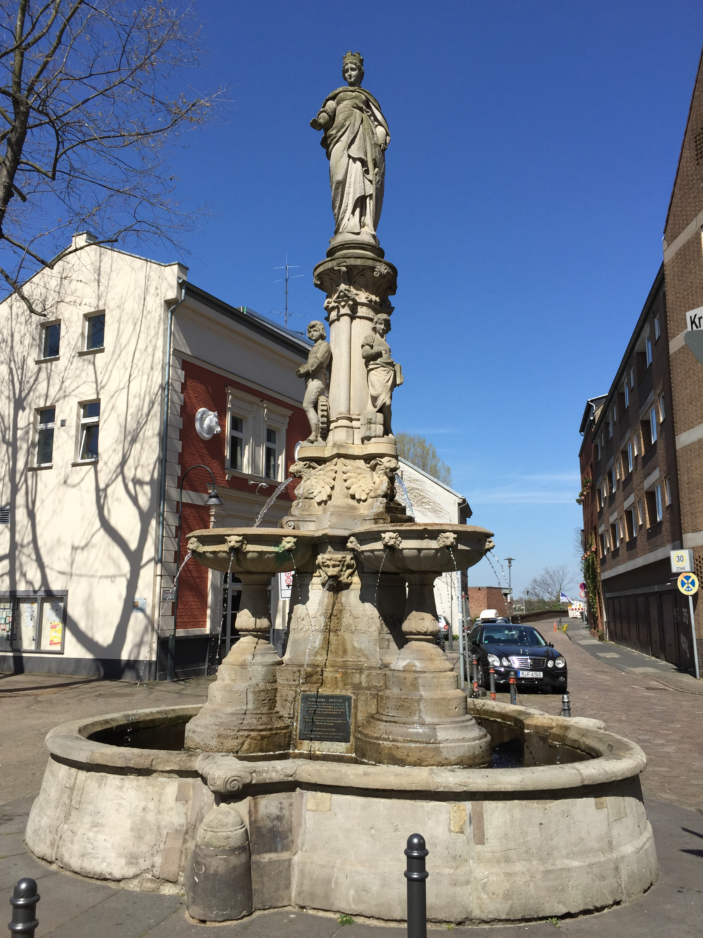 Stadtbrunnen Köln-Mülheim 2015